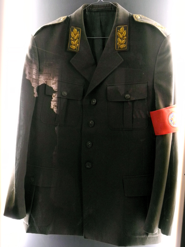 Izložba Domovinski rat u Hrvatskom povjesnom muzeju tijekom Noći muzeja.